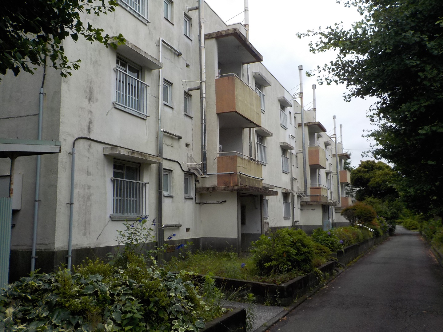 2018年6月、横浜市、相鉄線二俣川駅付近にある解体される前の 神奈川県営万騎が原団地 の3階建て住棟。この棟は現存せず。